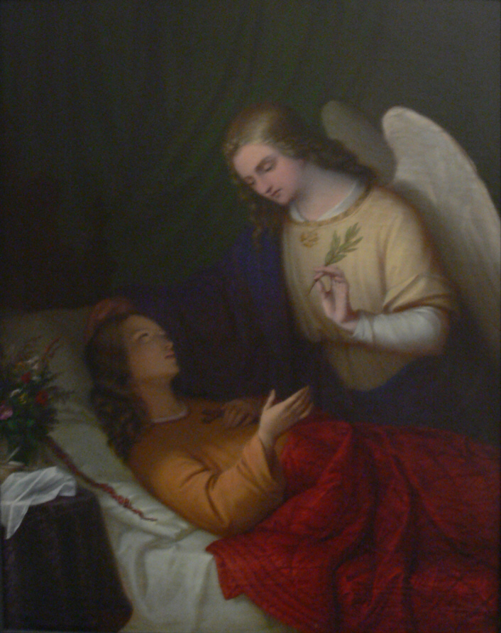 Liberat Hundertpfund (1806–1877): Sterbende Jungfrau Vorarlberger Landesmuseum, Bregenz